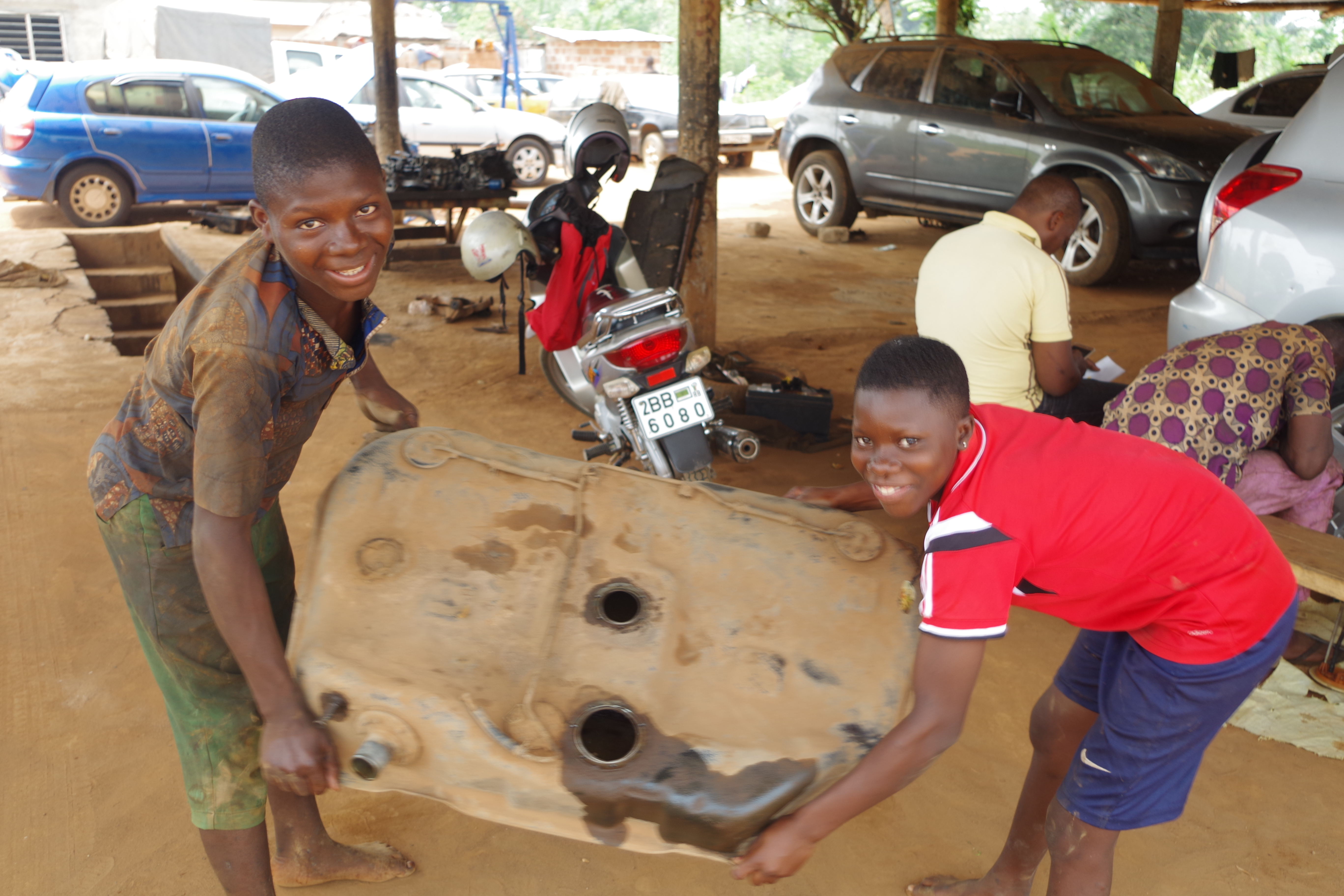 Lavage d'un réservoir d'essence de voiture entre un apprenti aidé par une fille qui ensemble secouent l'objet dans un garage mécanique auto à Zê au Bénin 2019